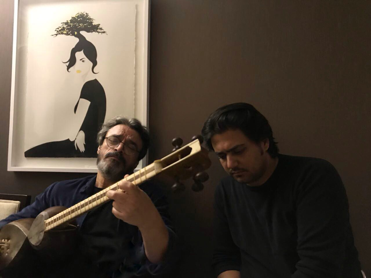 پوریا اخواص و استاد حسین علیزاده